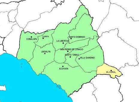 Mapa de Chontales